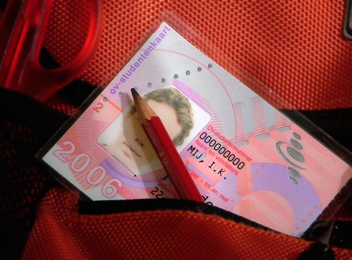 OV-studentenkaart voor Nederlandse studenten om gratis te reizen in het openbaar vervoer (bus, tram, metro en trein)